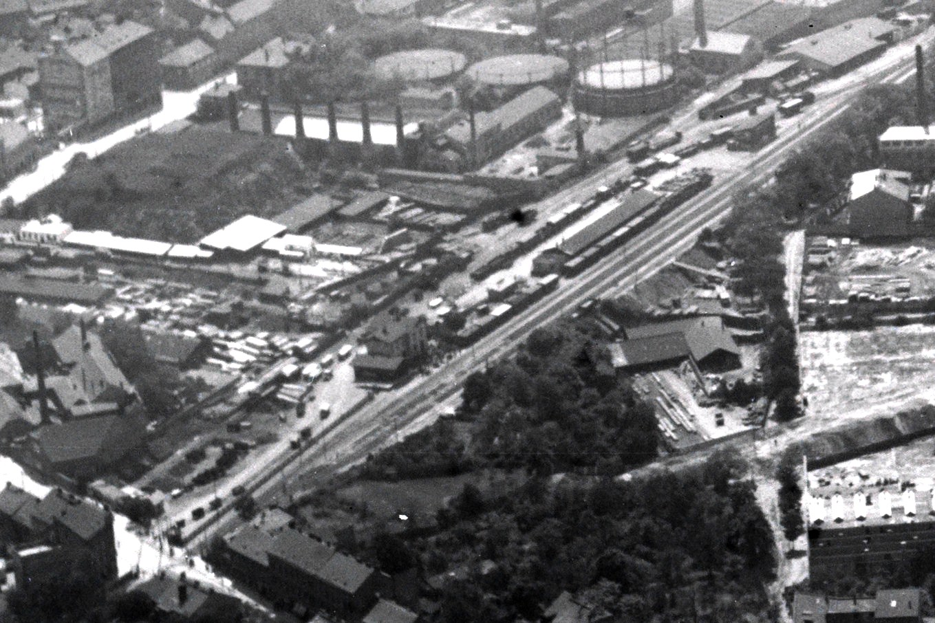 Praha-Libeň dolní nádraží v 30. letech 20. století, letecká fotografie